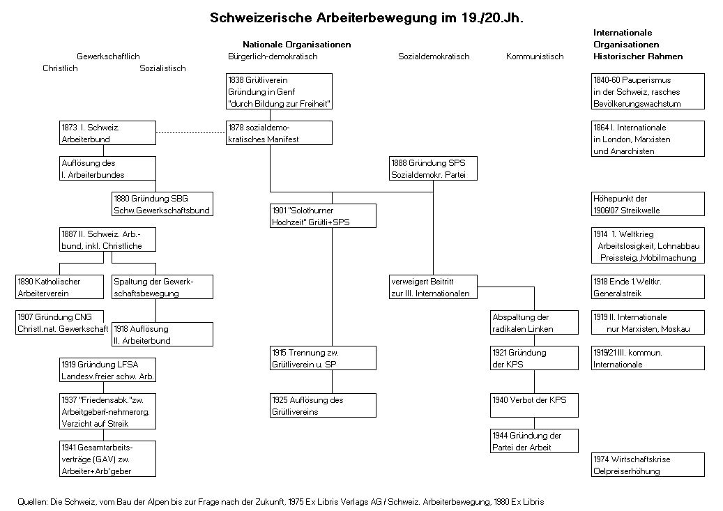 Schweizerische Arbeiterbewegung im 19./20. Jahrhundert